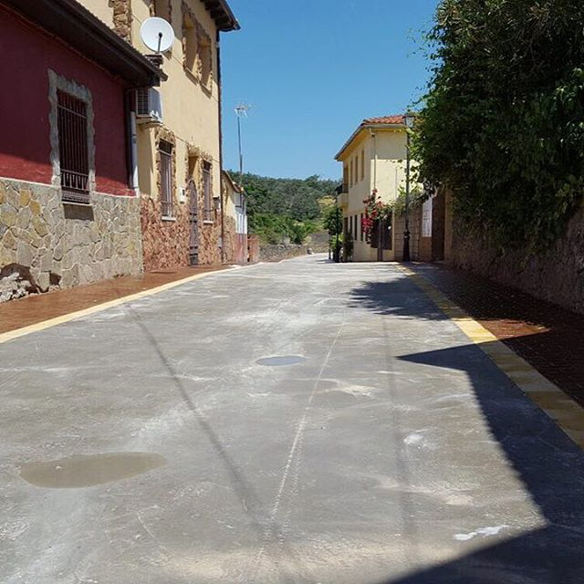 Calle Tenerías, Aceituna, provincia de Cáceres, España